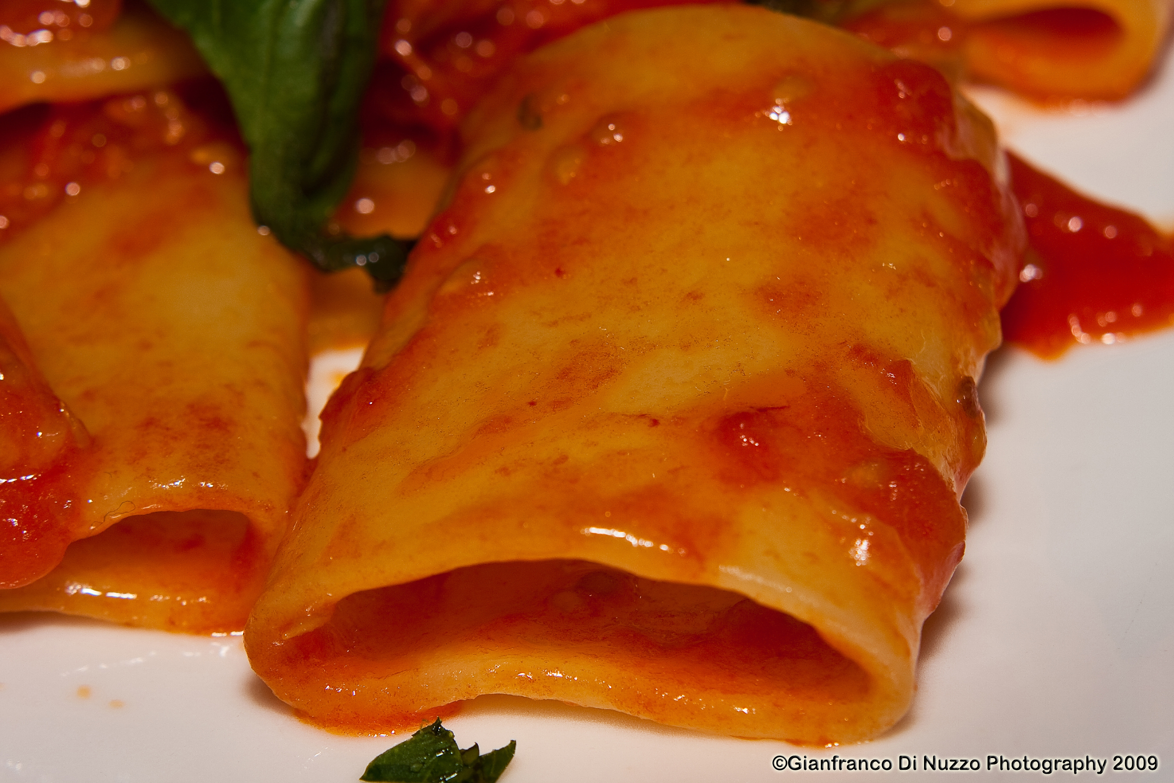 Paccheri di Gragnano al pomodoro – Italia.